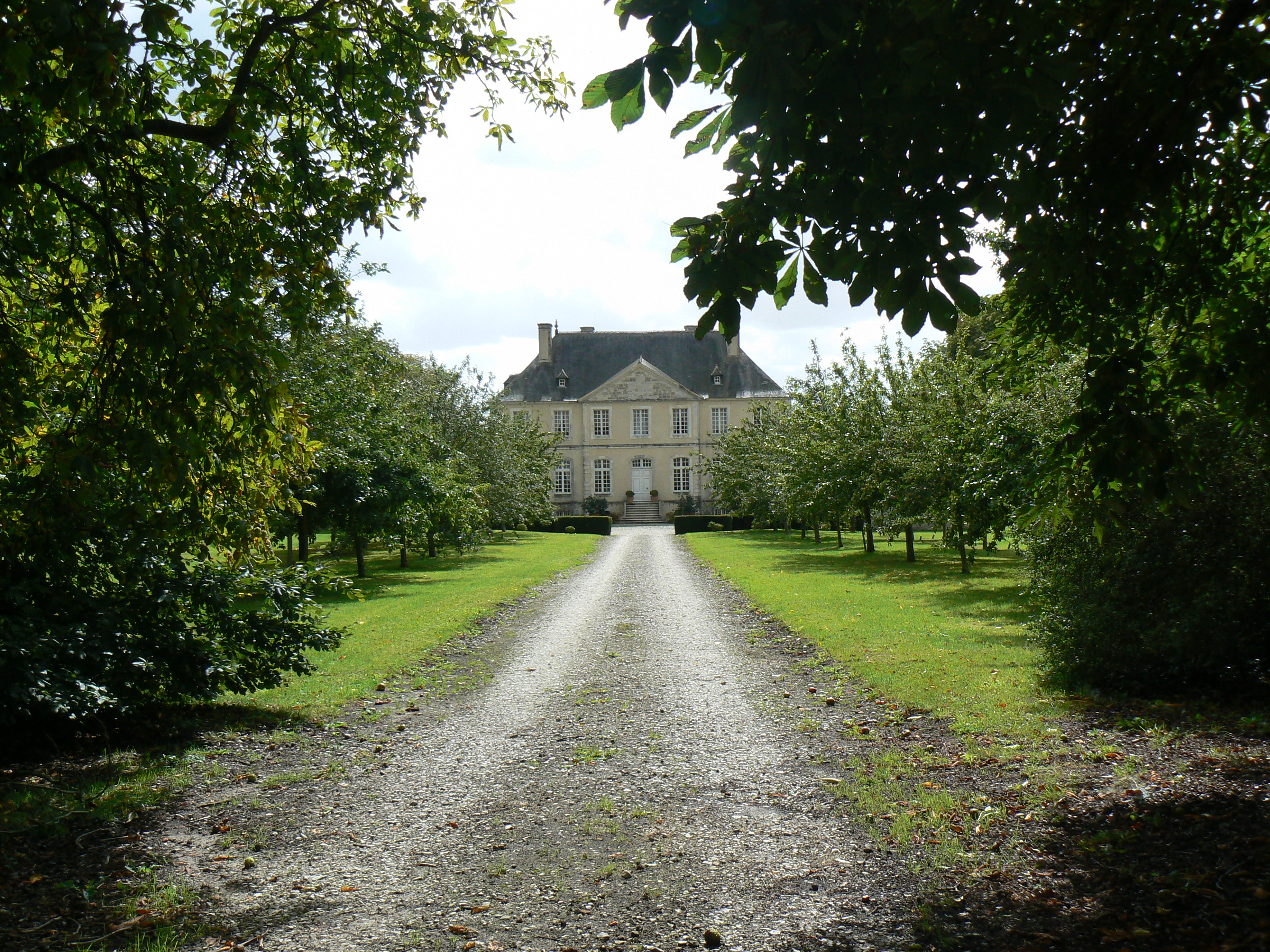 Château de Vierville (50)